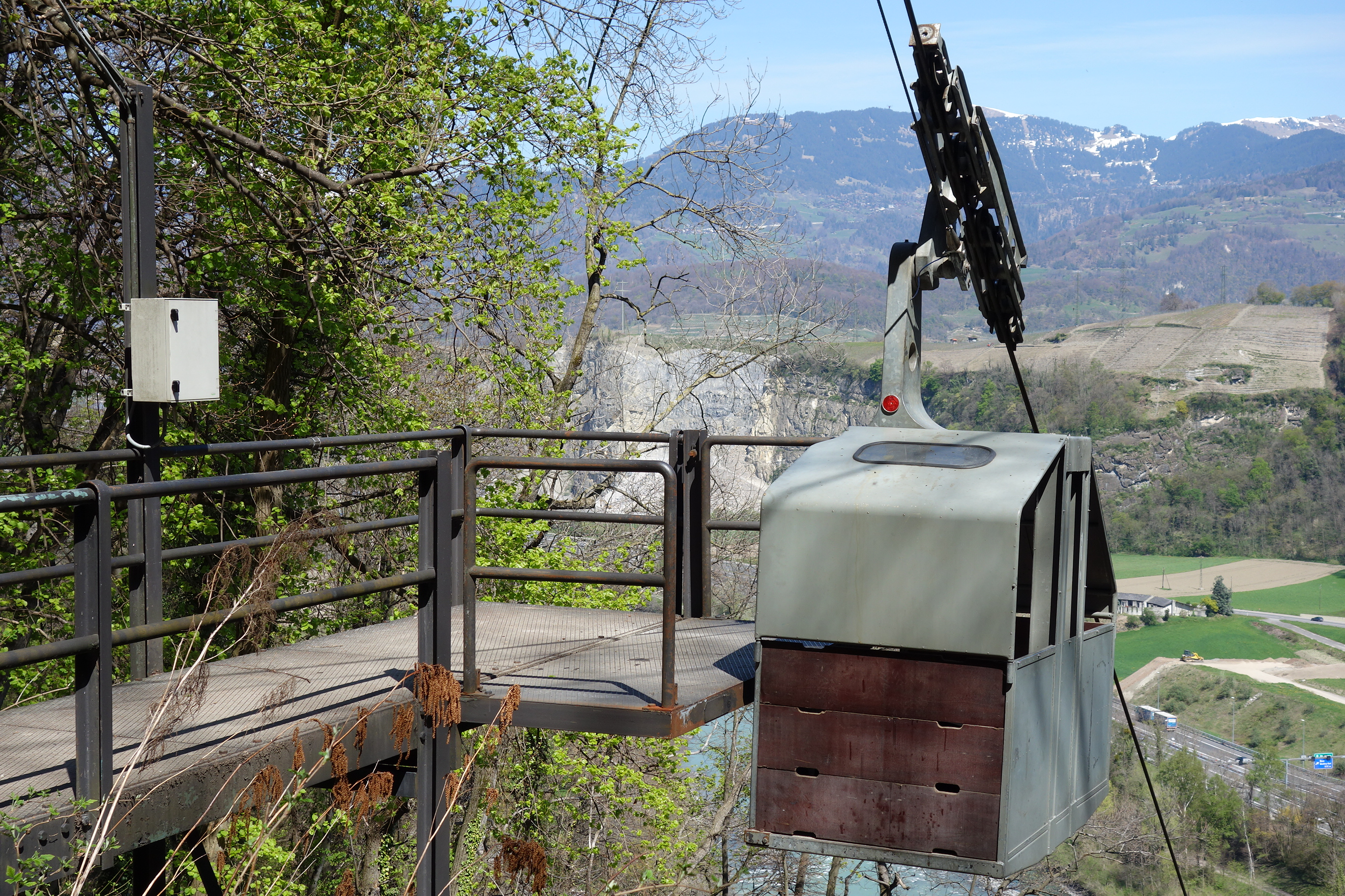 Fort de Cindey, Saint-Maurice VS, Schweiz